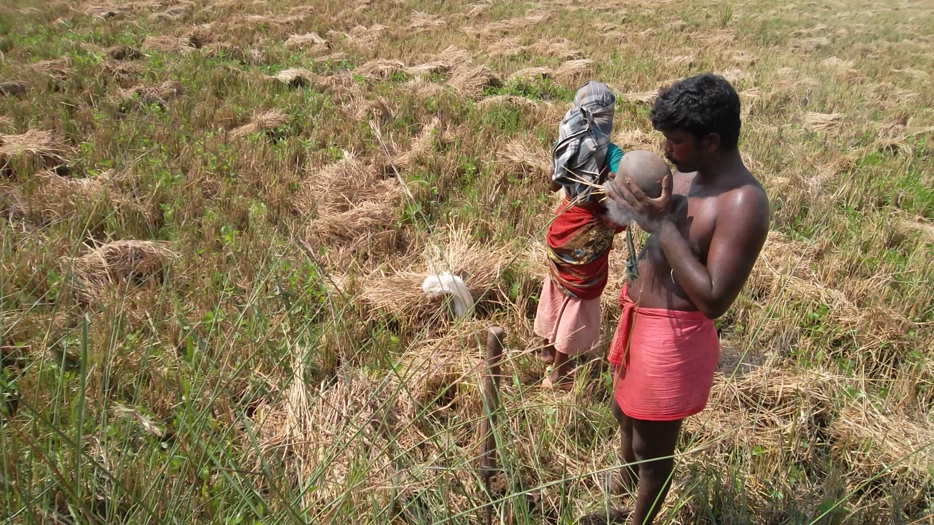 எலி பிடிக்கும் இருளர் படம் 3